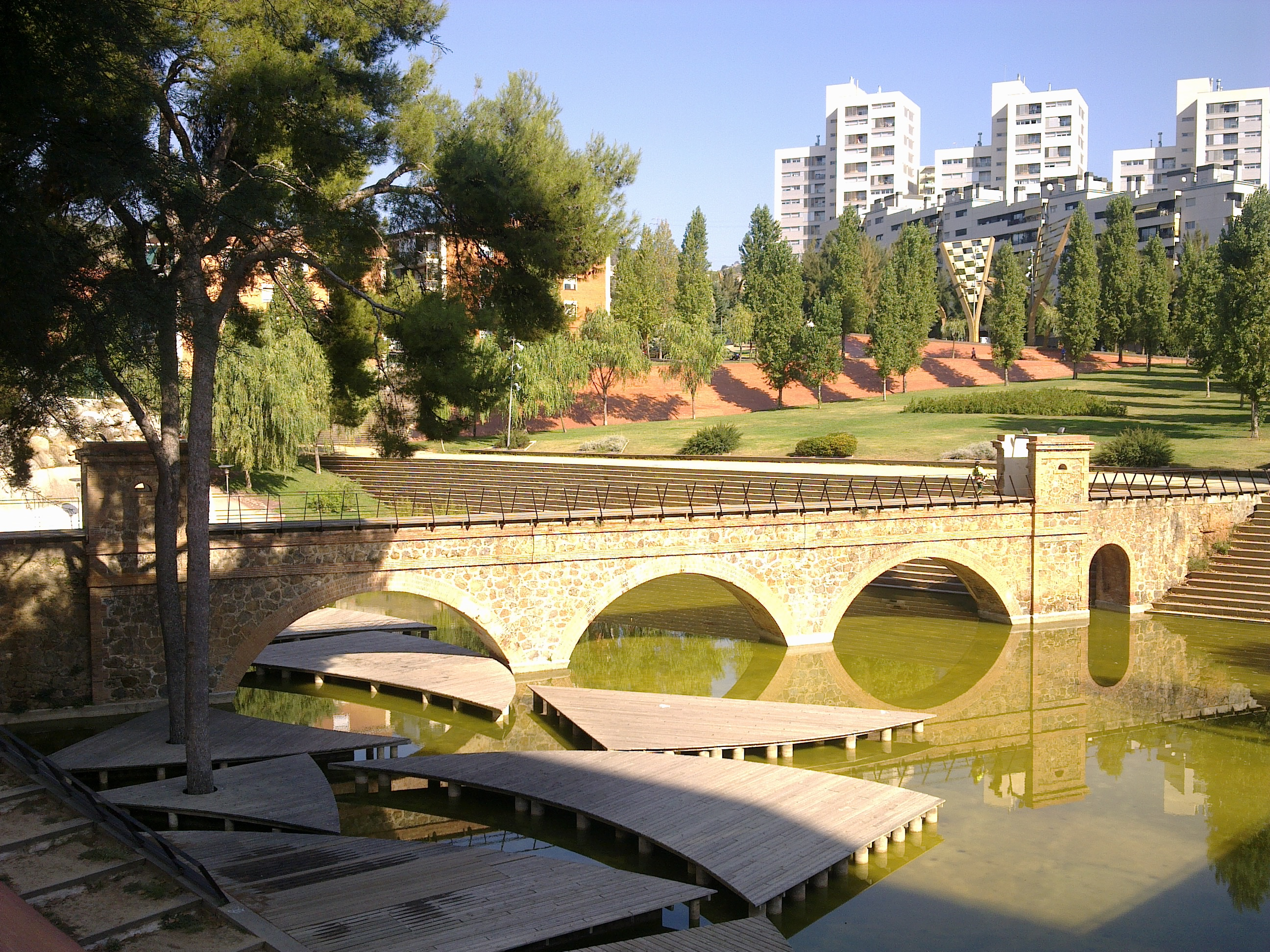 Barcelona